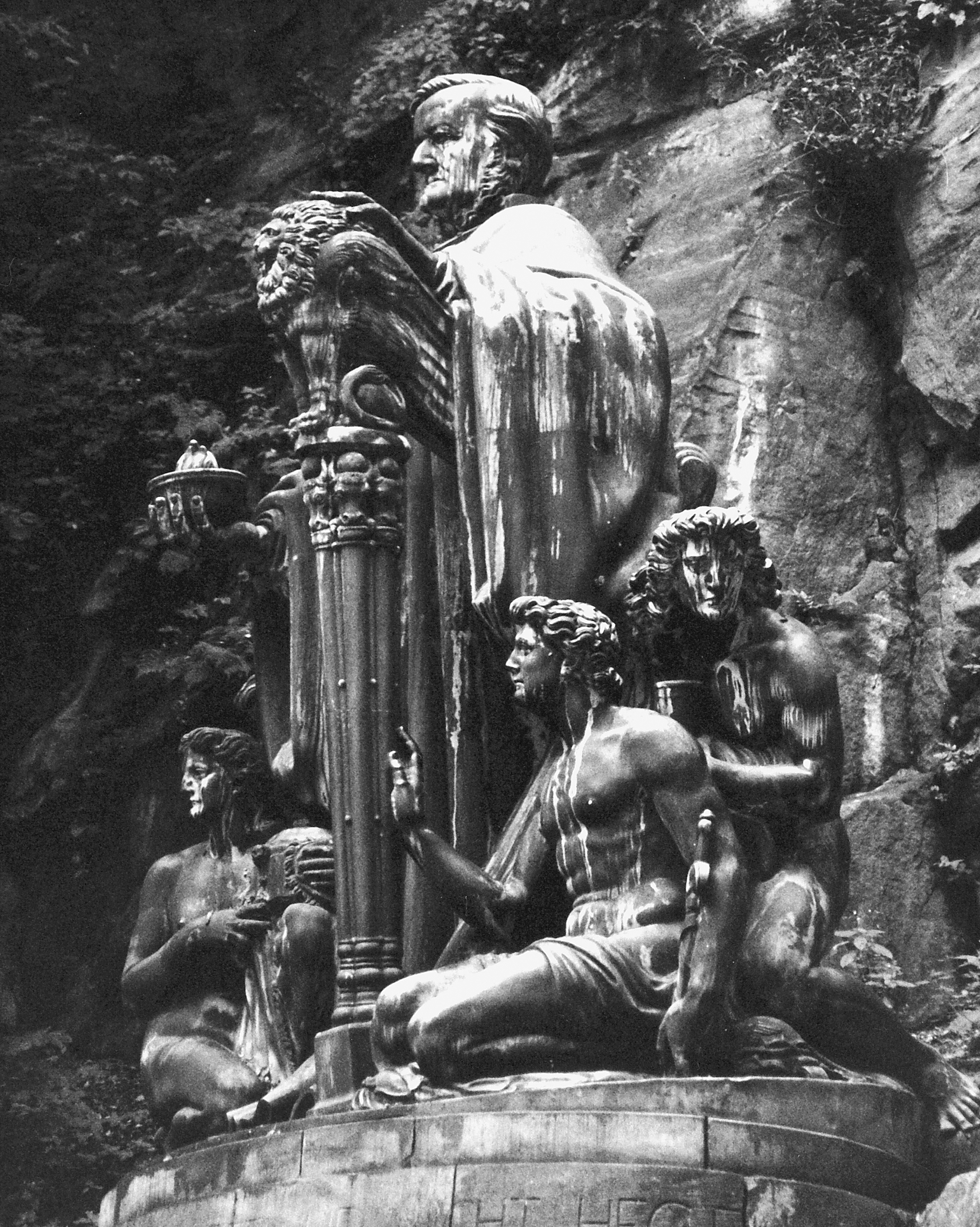 04.08.2002 Liebethal (Pirna), Lochmühlenweg: Richard-Wagner-Denkmal (GMP: 50.996902,13.965059) im Liebethaler Grund. Die 1933 unweit der Lochmühle errichtete Skulptur ist das weltgrößte Richard-Wagner-Denkmal. Die über vier Meter hohe Bronzestatue, die Wagner als Gralshüter darstellt, wurde bereits 1911/12 vom Dresdner Maler und Bildhauer Richard Guhr entworfen. [F20020804A02A.jpg]20020804300AR.JPG(c)Blobelt